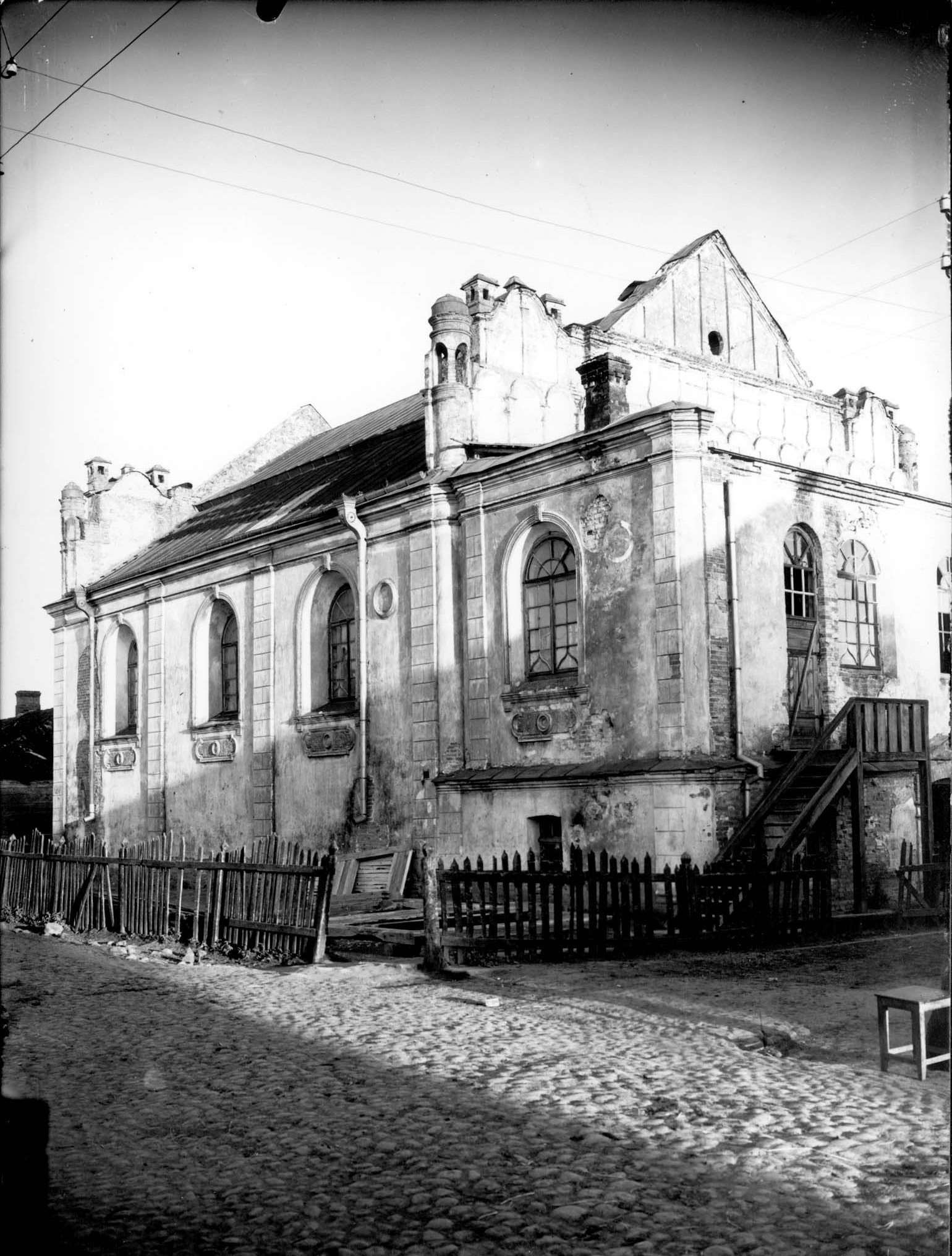 Велика синагога в Мацеїві (тепер Луків Волинської області).